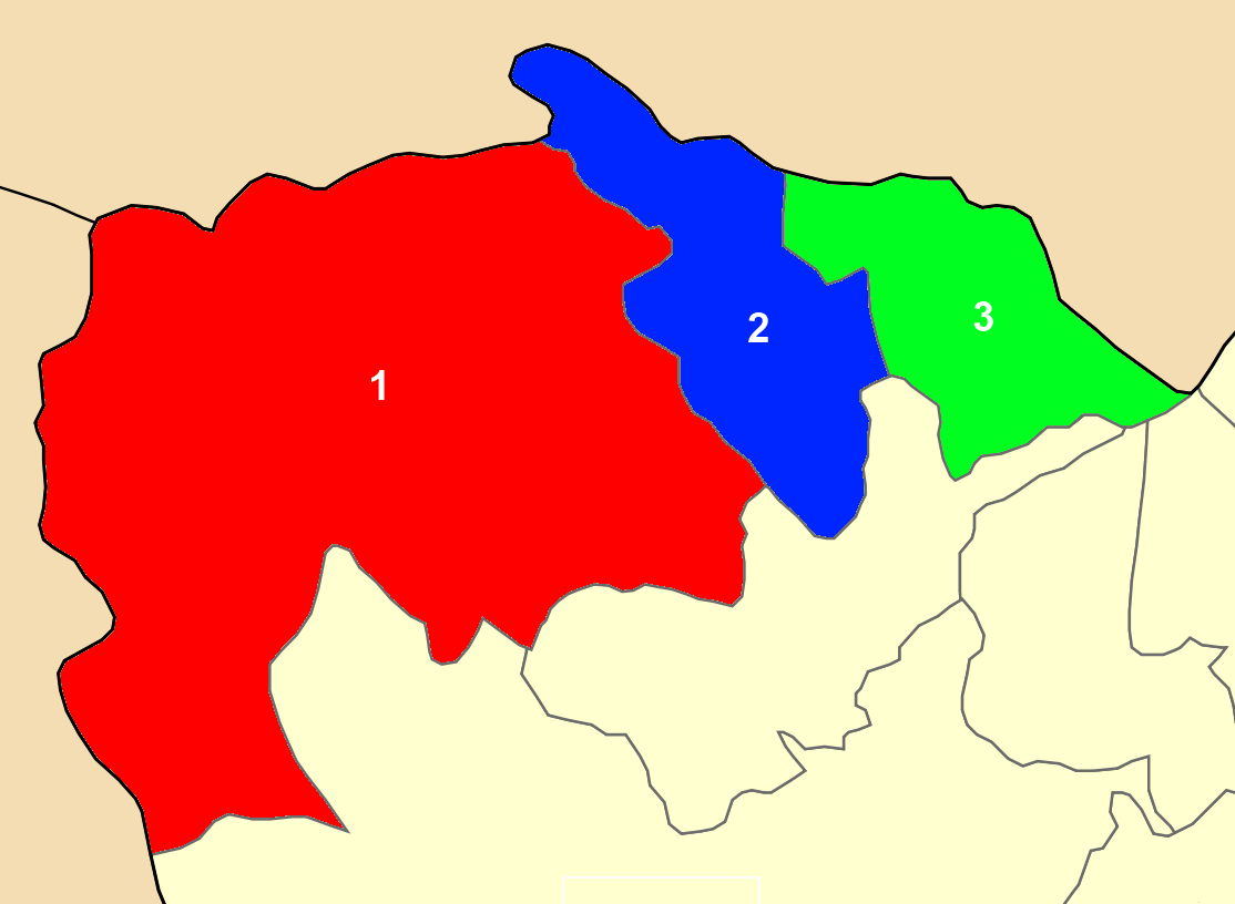 Χάρτης των ενοτήτων (και πρώην δήμων) από τις οποίες αποτελείται ο Δήμος Νάουσας